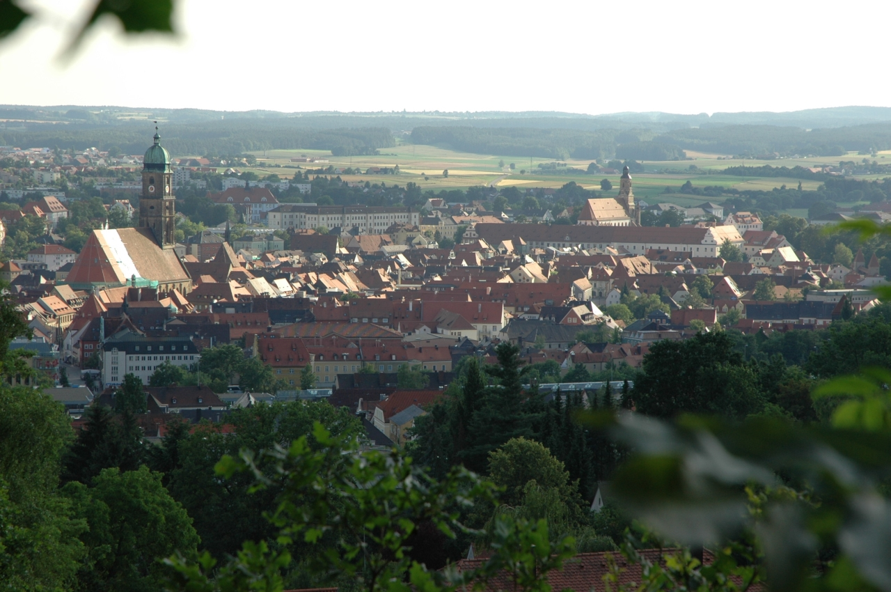 Amberg - Blick vom Maria-Hilf-Berg. Vorne links Martinskirche, hinten rechts Georgskirche mit davor liegendem Maltesergebäude